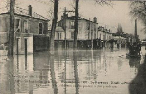 Le Perreux :quartier de la Maltournée